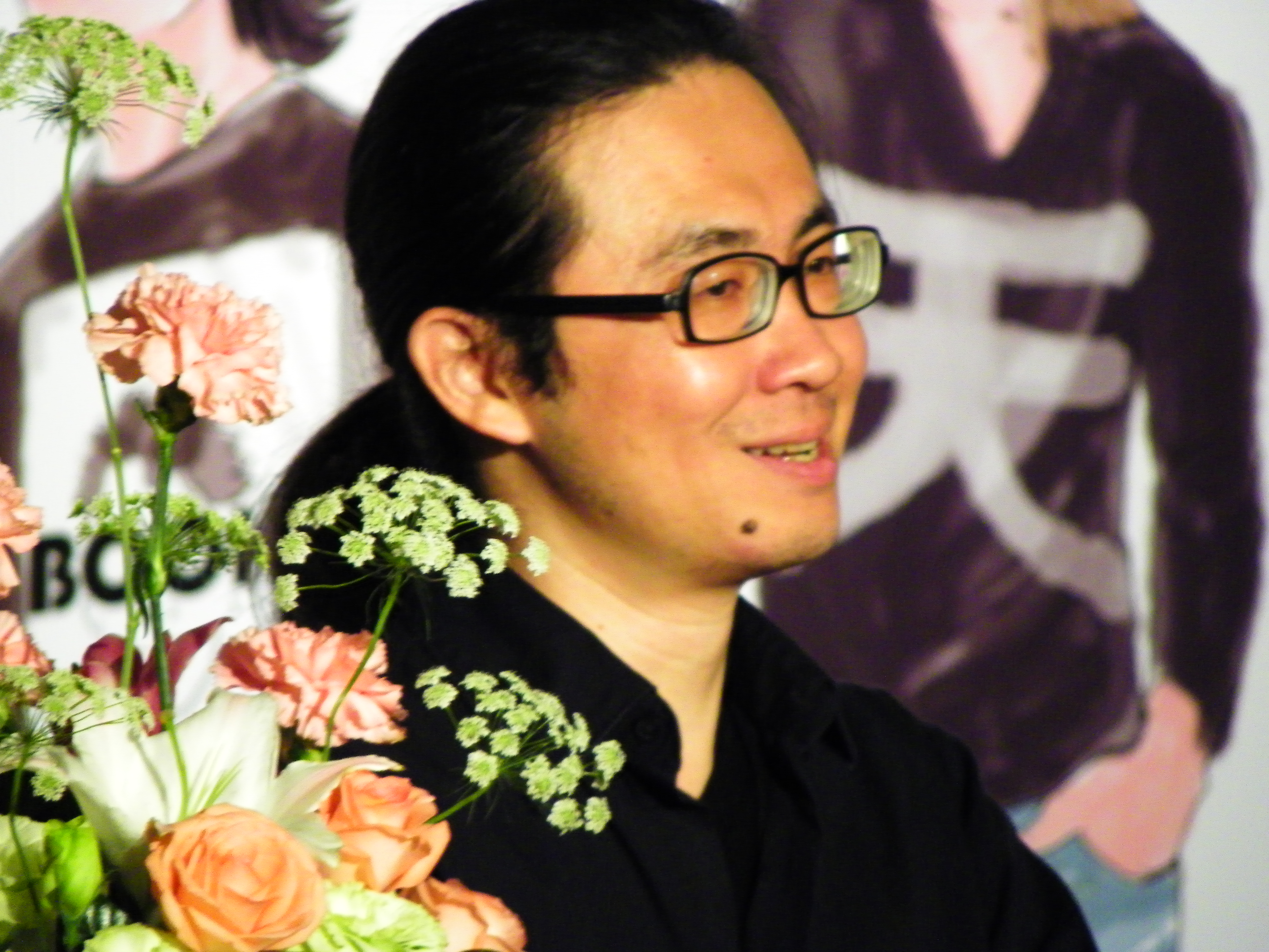 2013年臺北國際書展，世貿二館＜天國餐廳＞（蓋亞文化）簽書會的阮光民。